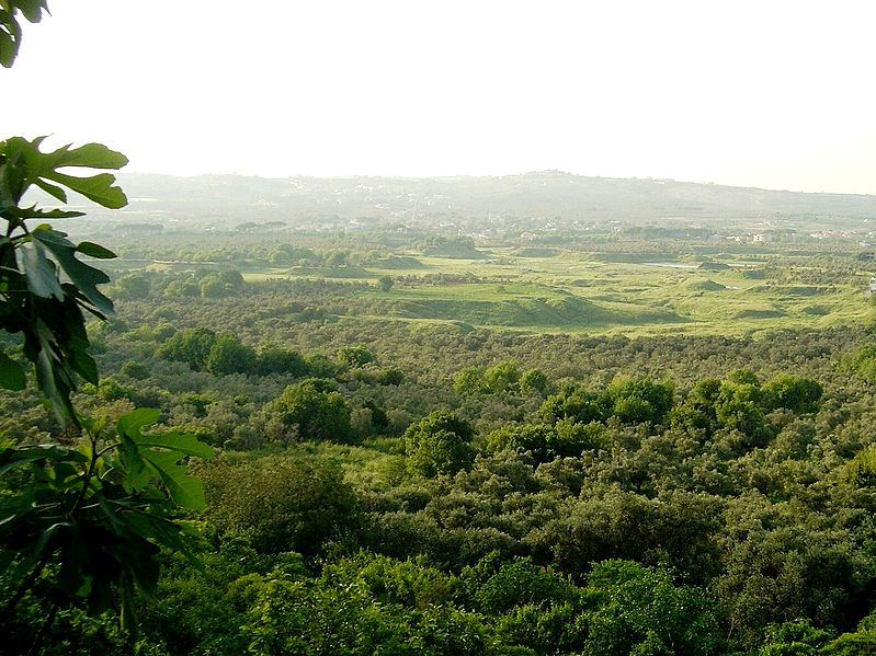 ساتين زيتون في بلدة أميون، قضاء الكورة، لبنان.